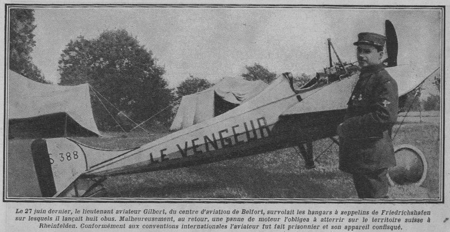 l'aviateur Eugène Gilbert posant devant son avion Morane : Vengeur.